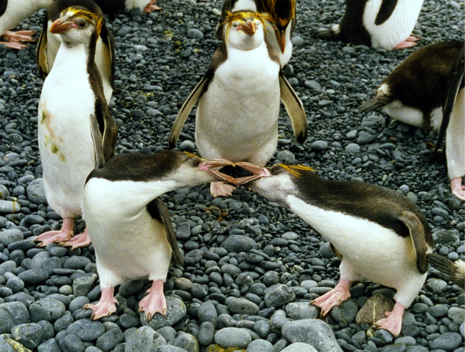 Two Royal penguins arguing.